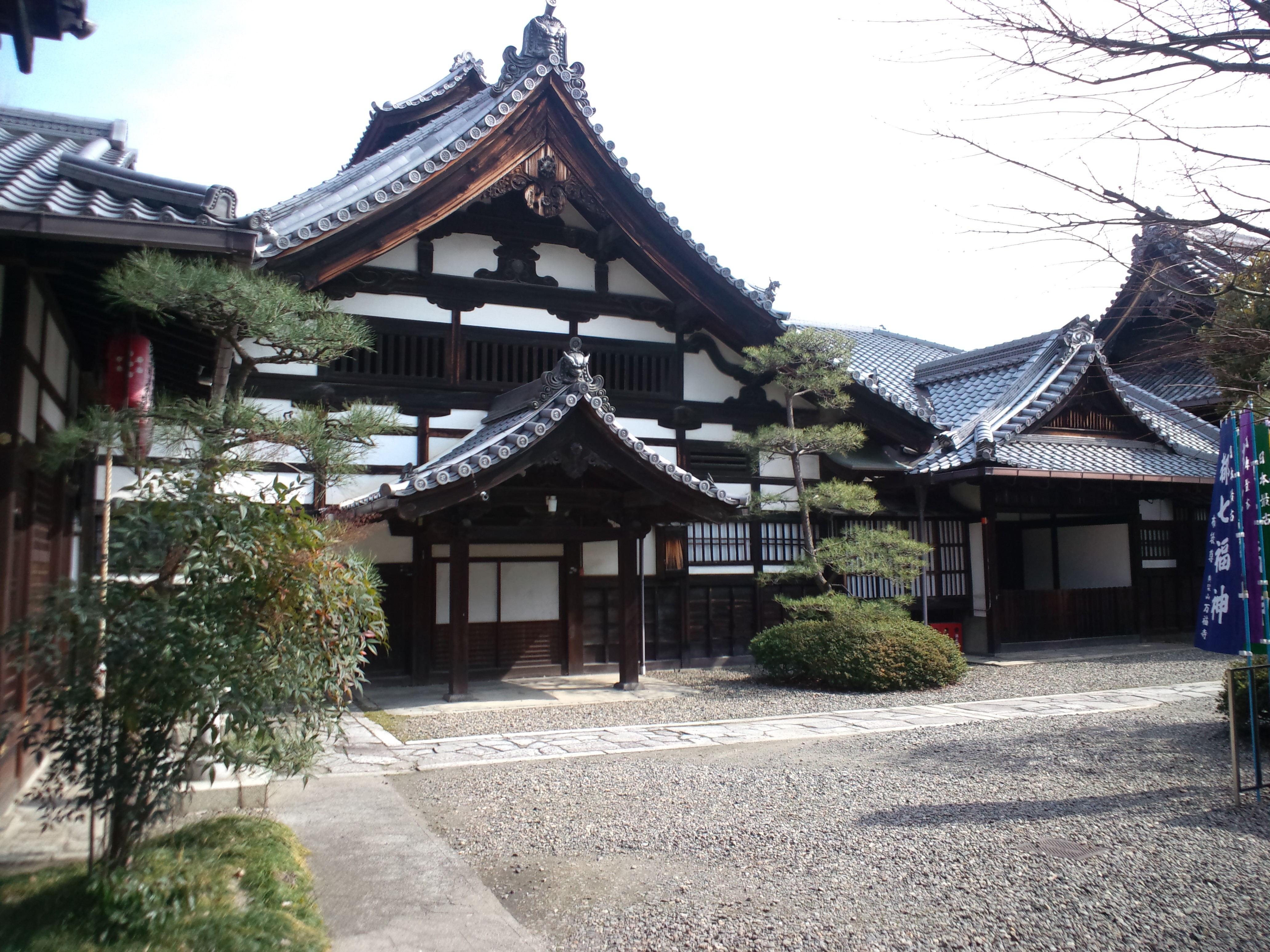 行願寺 革堂 寺務所